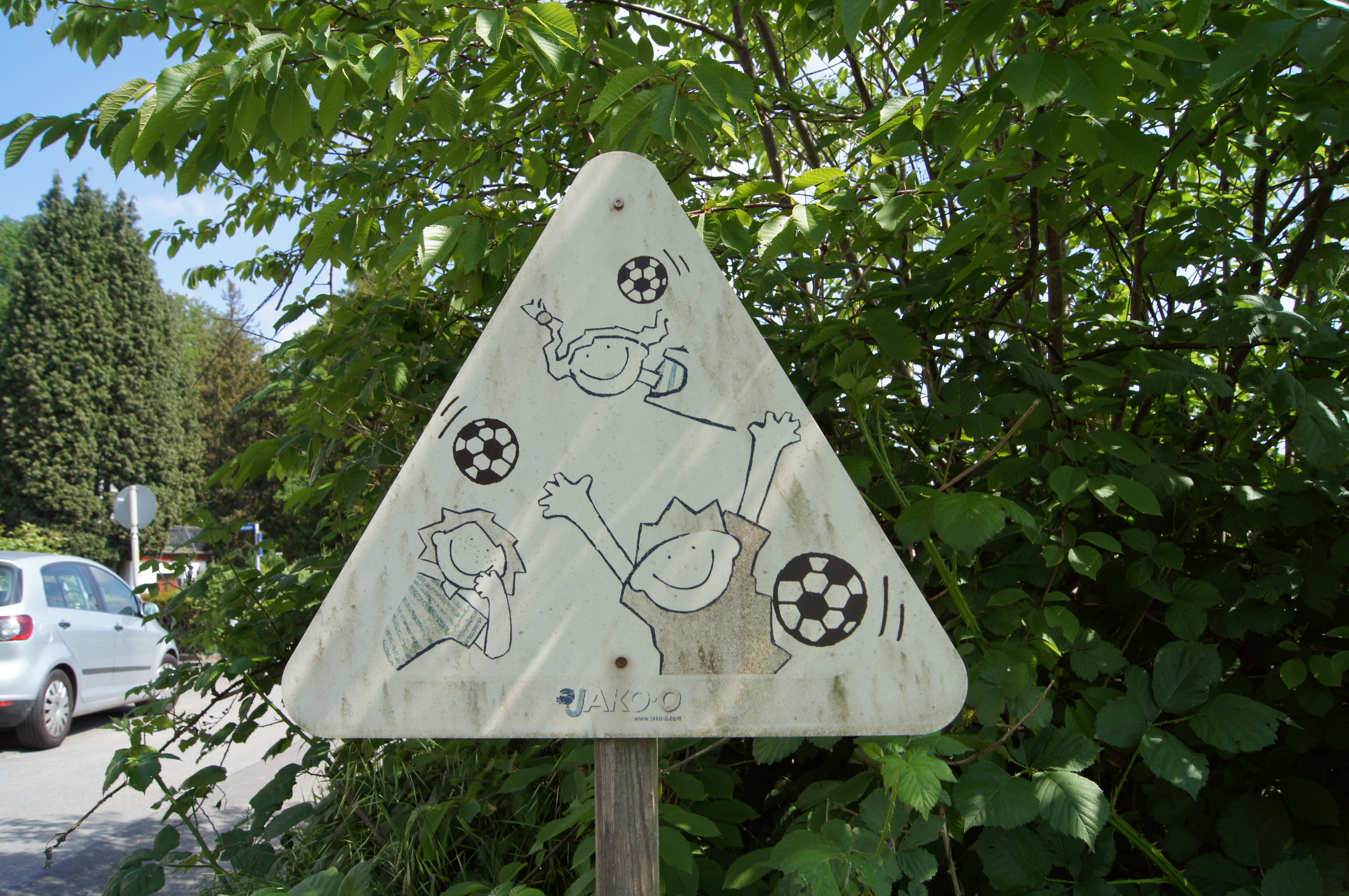 Inoffizielles Verkehrsschild Spielstraße mit dem Logo des Versandhändlers JAKO-O in der Straße Am Goltenbusch in Witten-Bommern, Deutschland